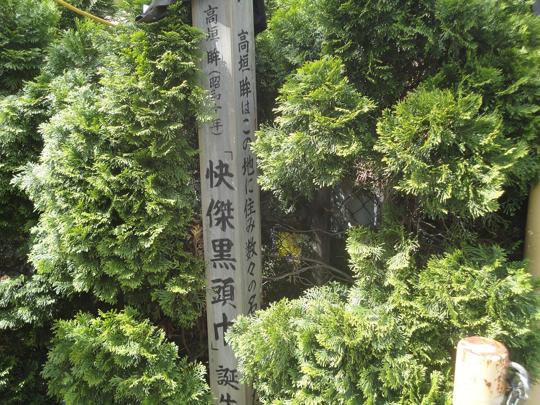 快傑黒頭巾生誕の地。